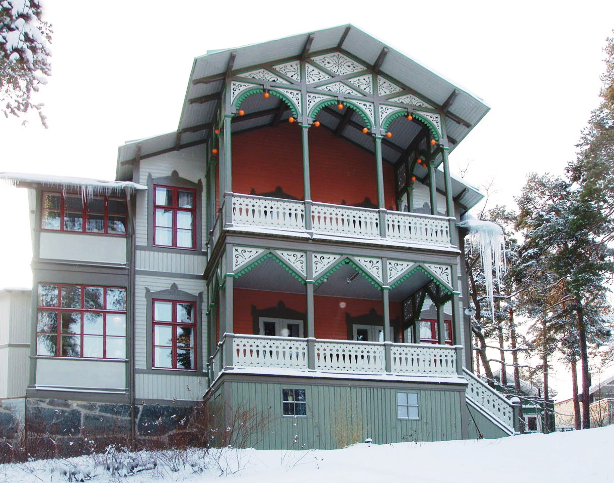 Den s.k. Apelsinvillan (även Villa skogsbacken) vid Kottlasjön på Lidingö, uppförd av snickarmästare P.J. Asker på 1890-talet. Villan är byggnadsminne.